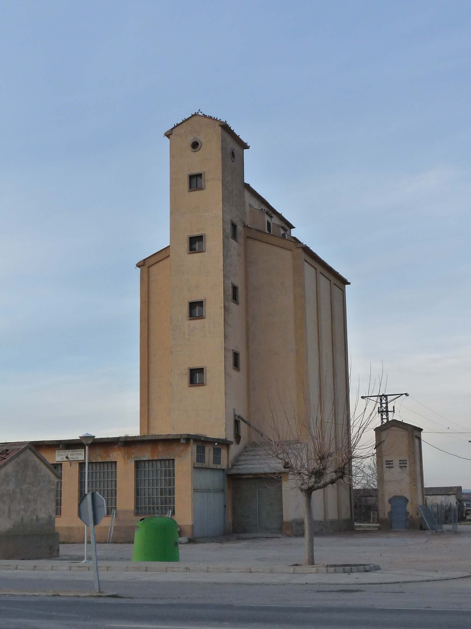 Candasnos - Silo de grano del Servicio Nacional de Cereales